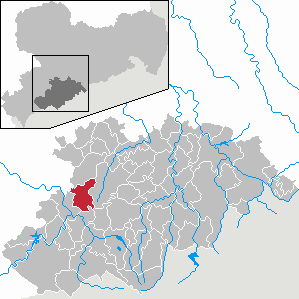 Lößnitz im Erzgebirgskreis, Sachsen